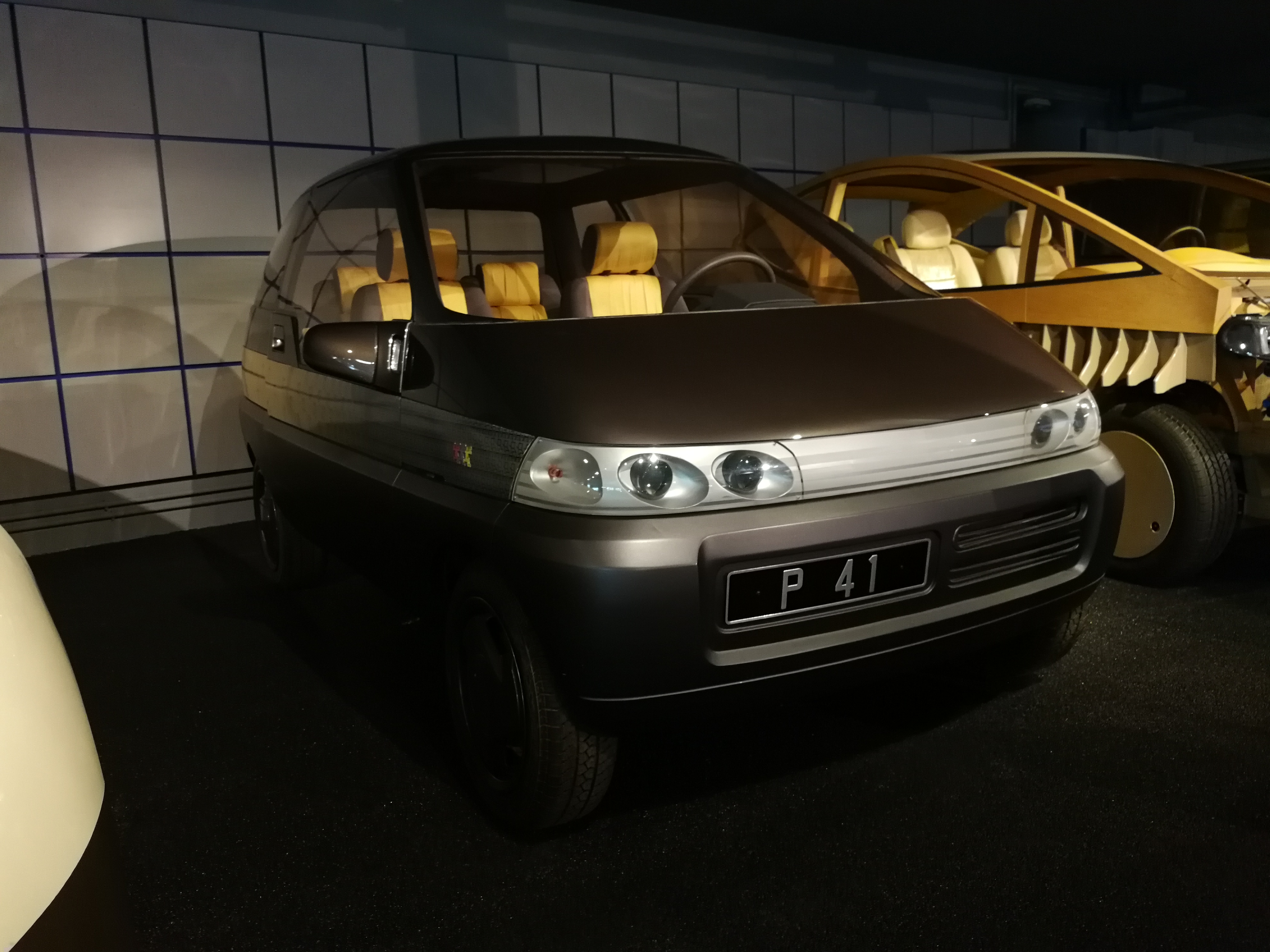 Matra P41 de 1990, précurseur de la Twingo.